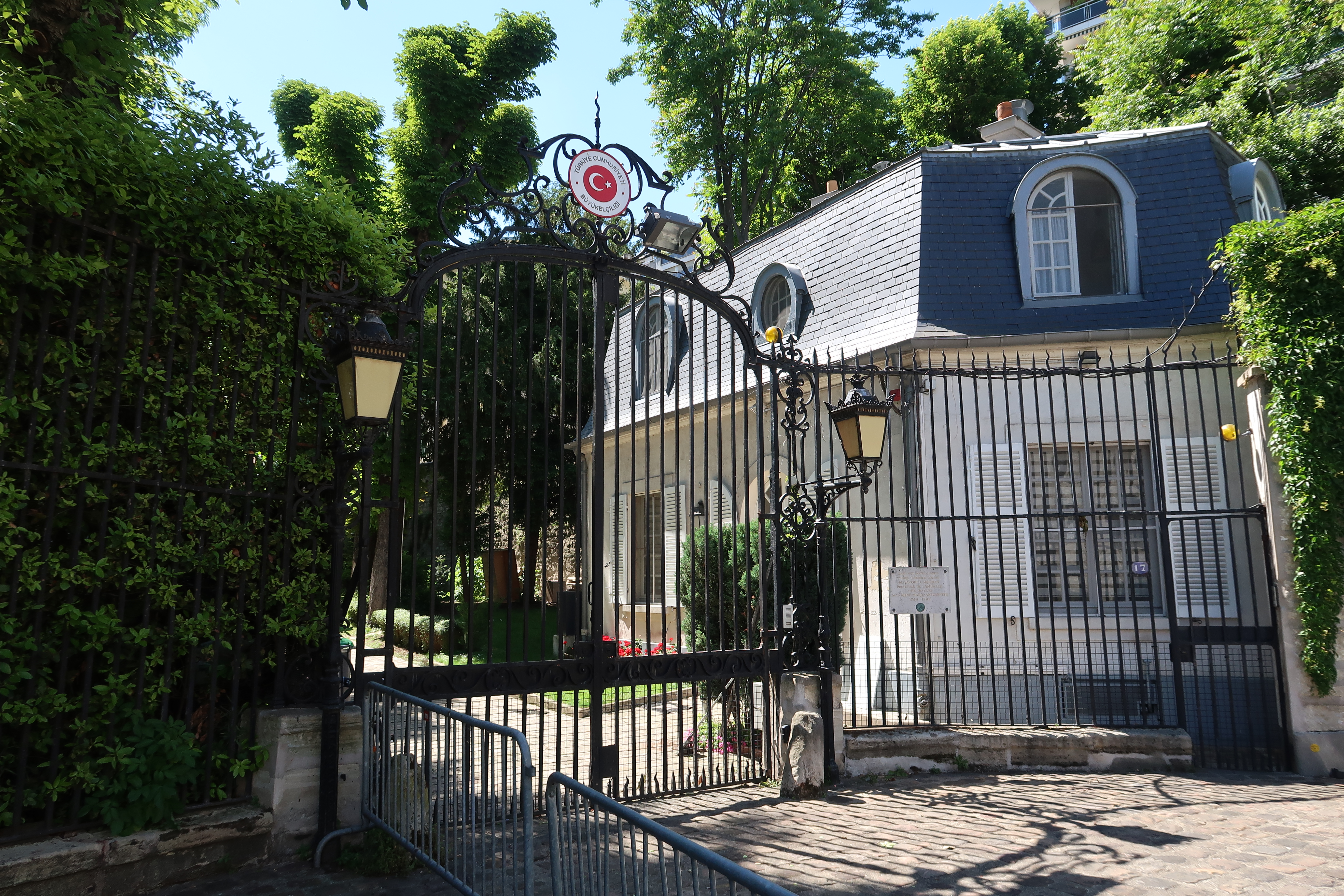 Entrée de l'hôtel de Lamballe (ambassade de Turquie), 17 rue d'Ankara (Paris, 16e).